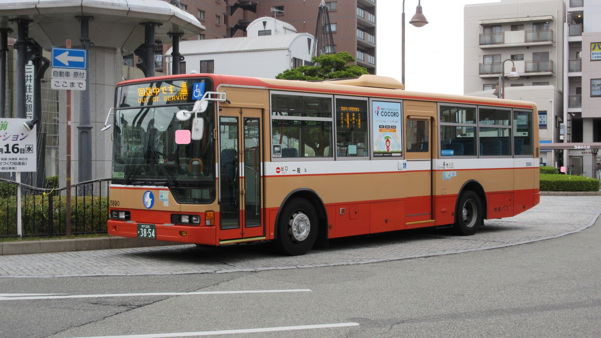 神姫バス 久5890（大久保駅前）